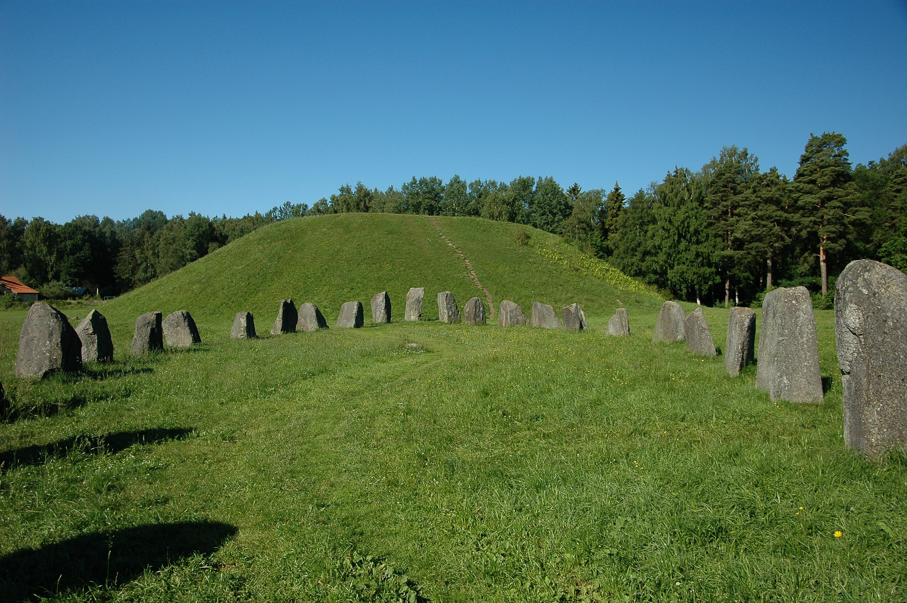 Anundshög, Västerås